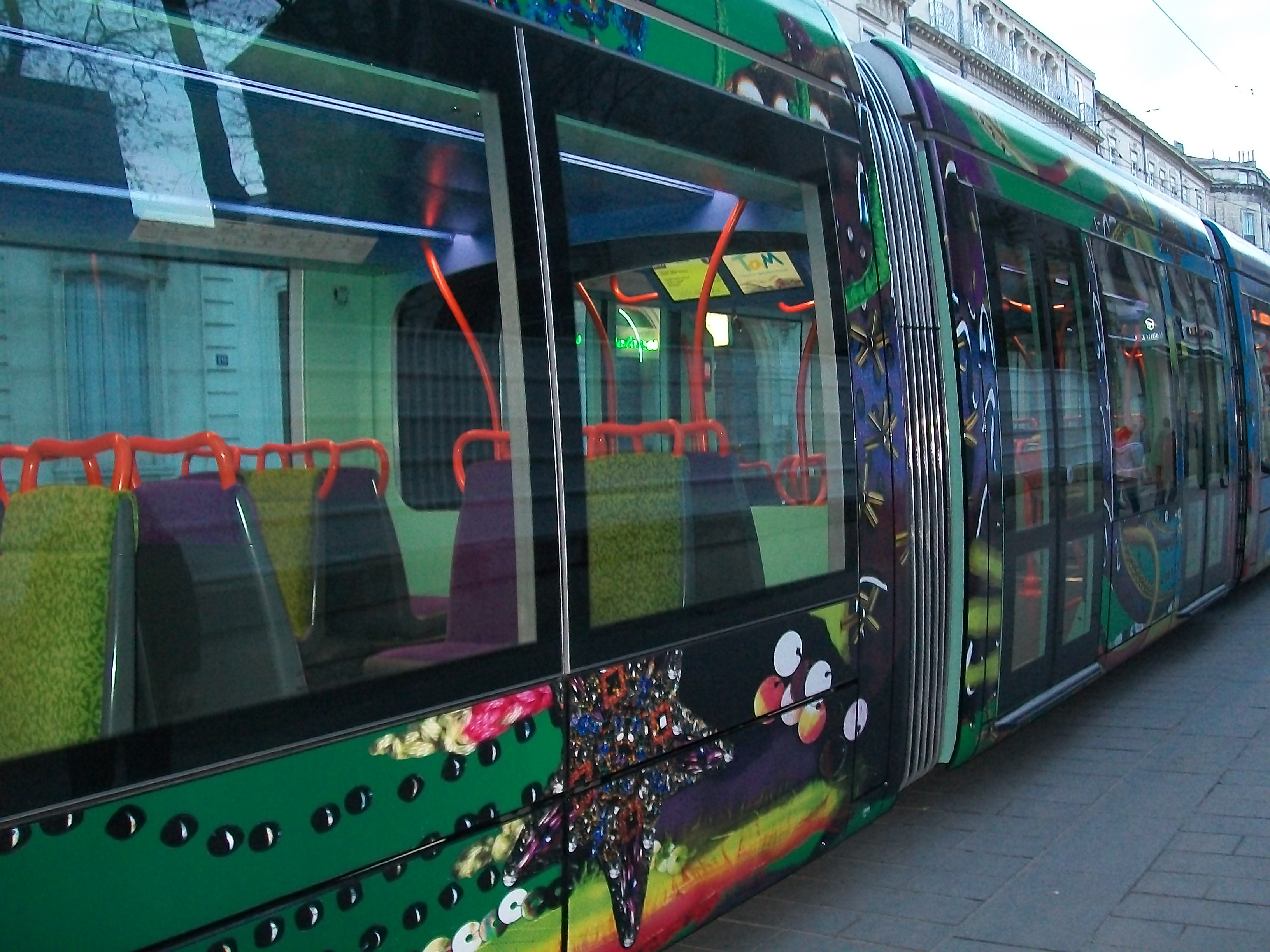 Présentation d'une rame de la ligne 3 du tramway inaugurée le 6 avril 2012 à Montpellier. Cette ligne fera le trajet entre Juvignac et Pérols (Étang de l'Or) sur 19,5 km. Le design est signé Christian Lacroix.